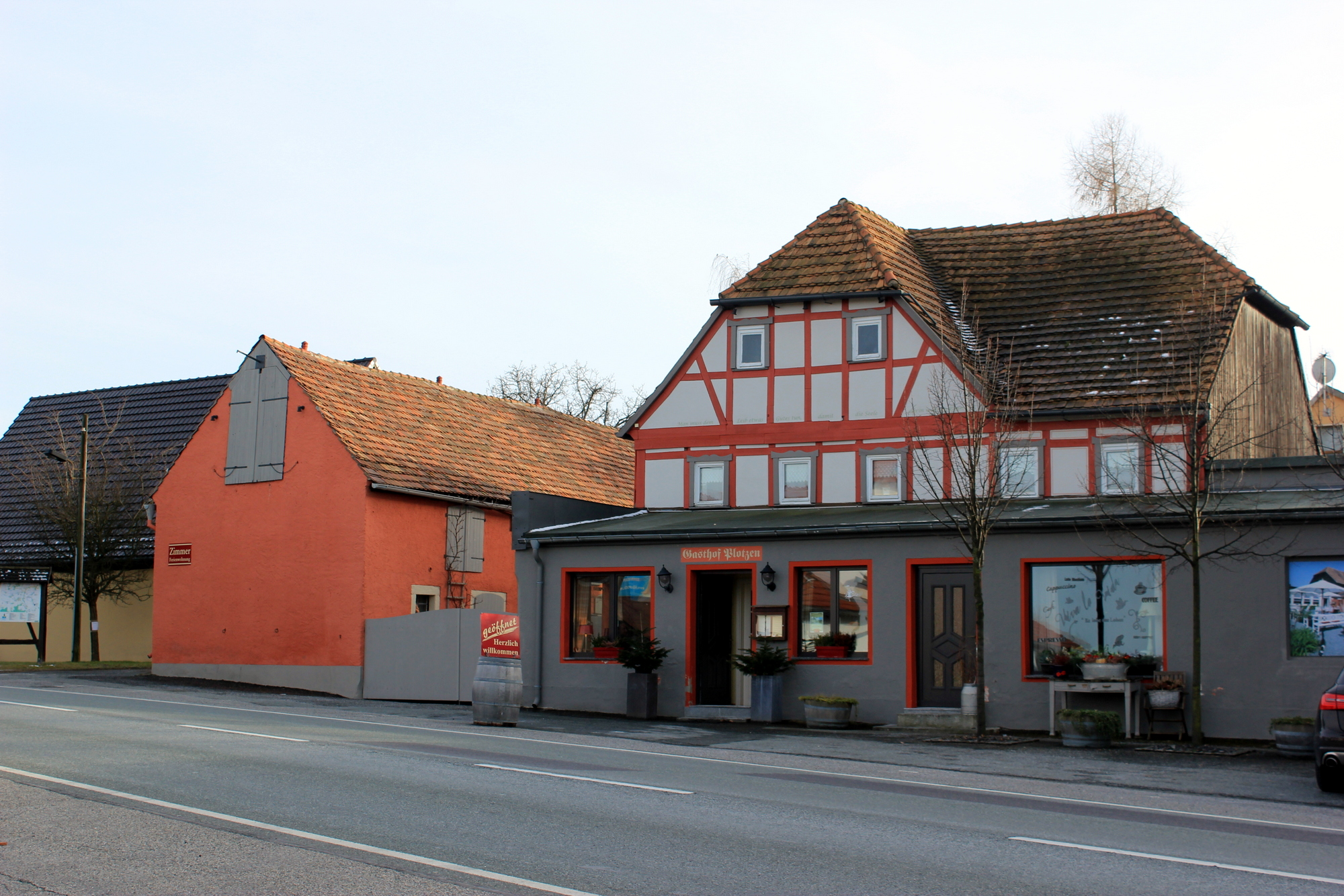 Hornjoserbsce: Hosćenc w Błócanach (Bukečanska gmejna). Zapisany kulturny pomnik.